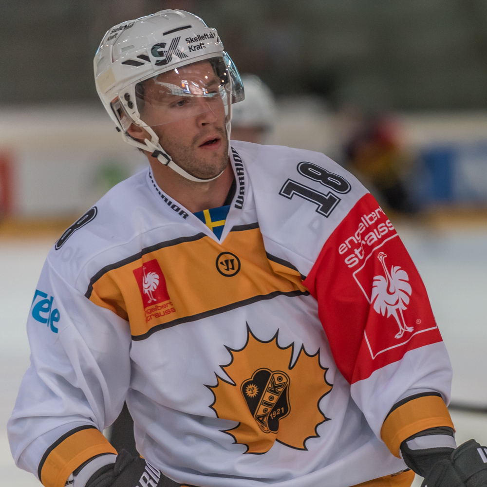 Champions Hockey League - Vienna Capitals vs Skelleftea AIK am 18.08.2016. Bild zeigt Pontus Petterstroem (Skelleftea AIK).